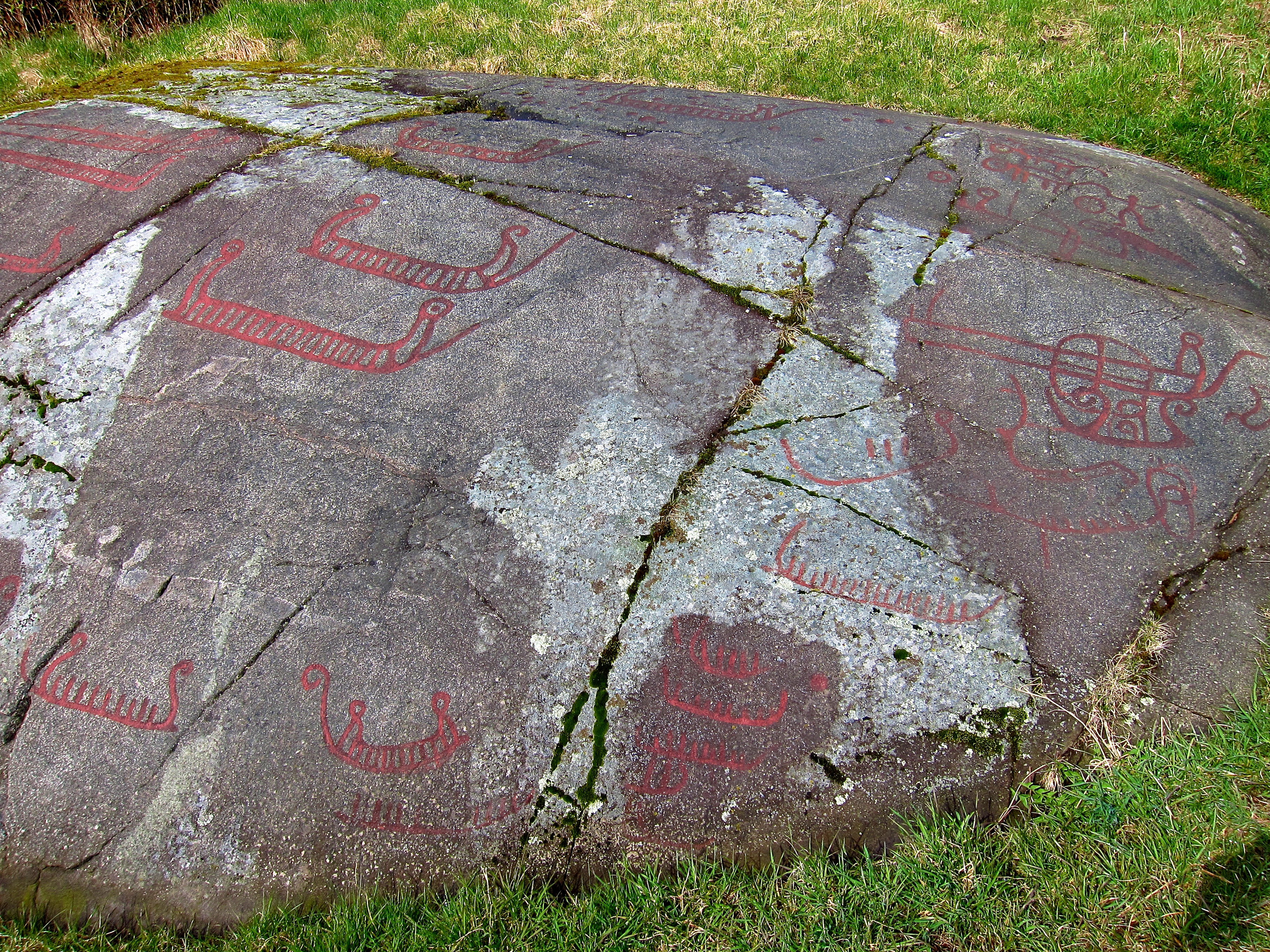 Hällristningar, Alvhem, Jätteberget i Ale kommun, Västergötland, Västra Götalands län, Sverige.